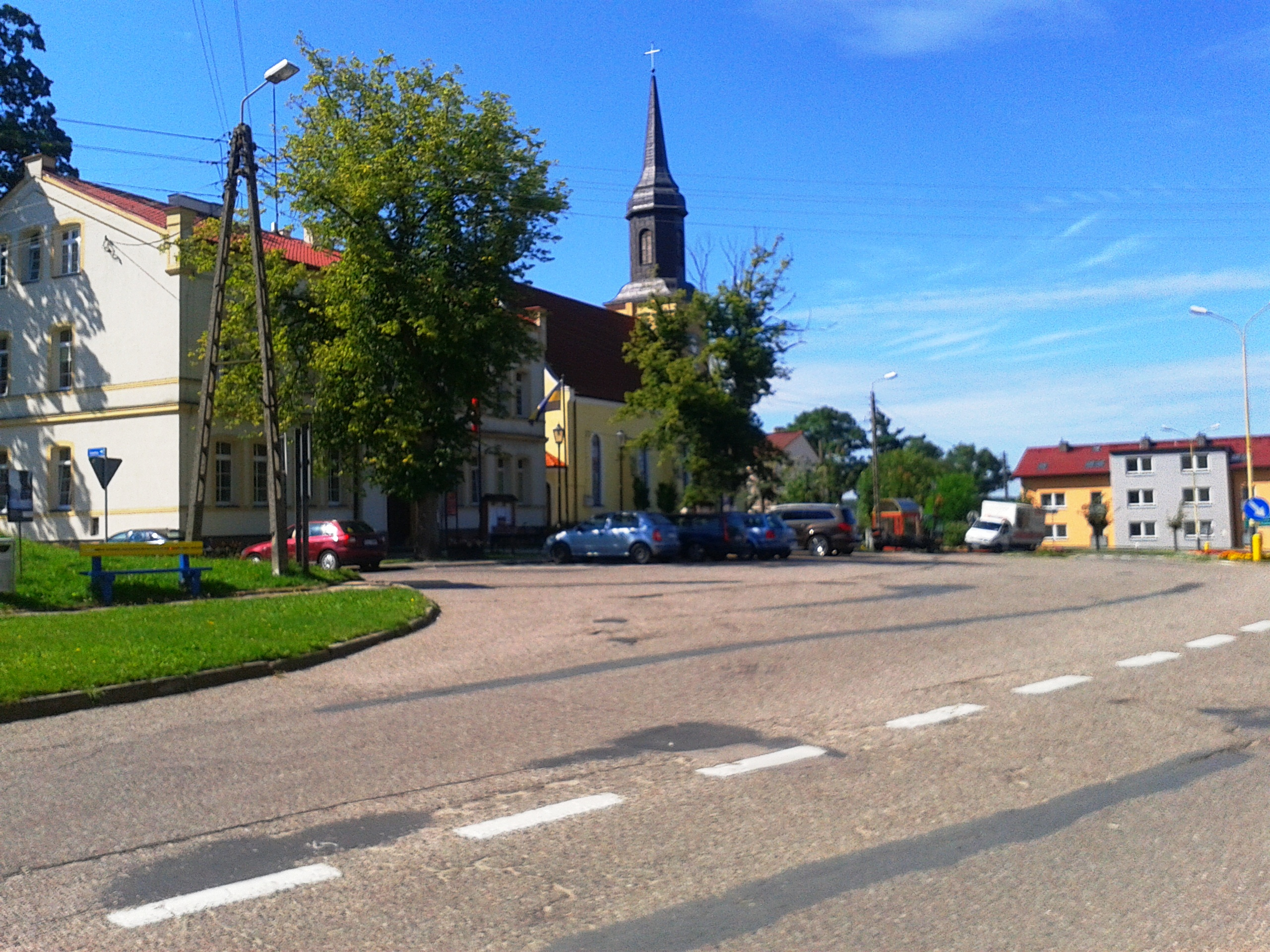 Węgorzyno - ratusz i kościół